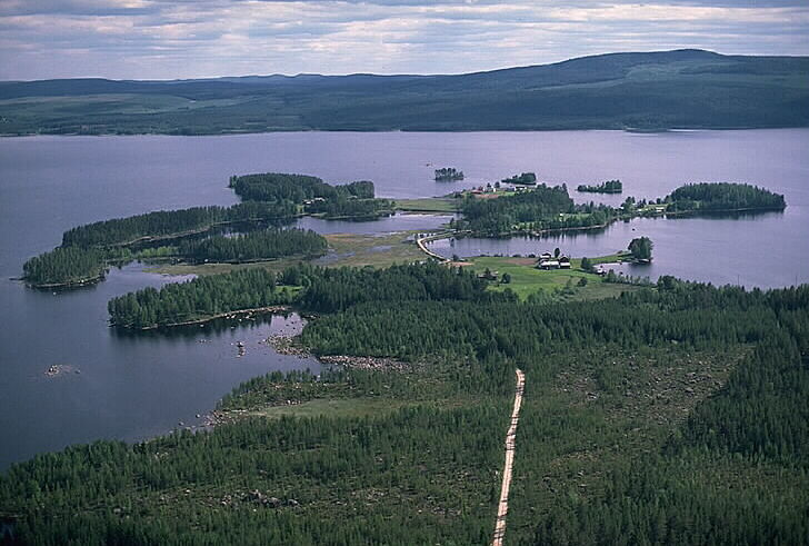 Holmsjön (och fornlämningsnummer, RAÄnr 2465:11). Motiv: Holmnäset Nyckelord: Flygbilder, Riksintressen Kategori: Insjömiljöer Holmsjön (och fornlämningsnummer, RAÄnr 2465:11).